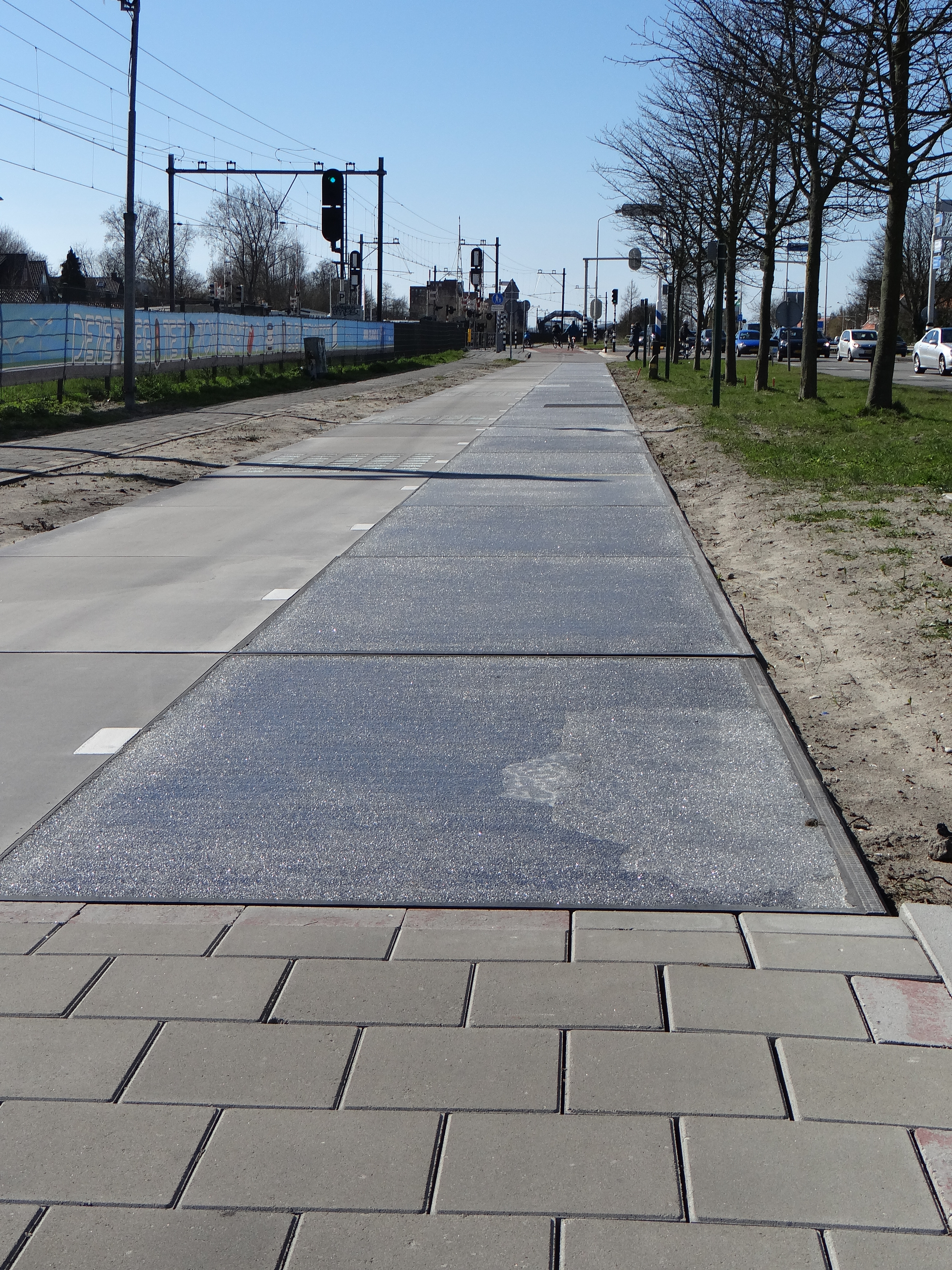 Solaroad8